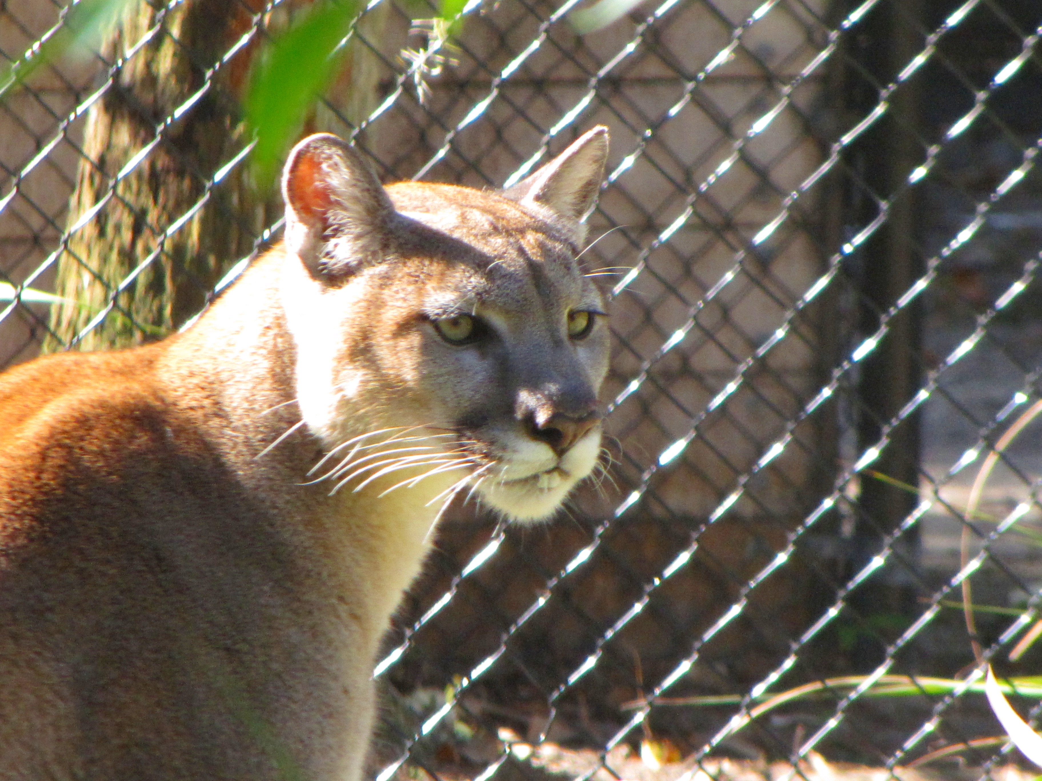 Puma concolor coryi Head Homossassa Springs State Park Homossassa, Florida